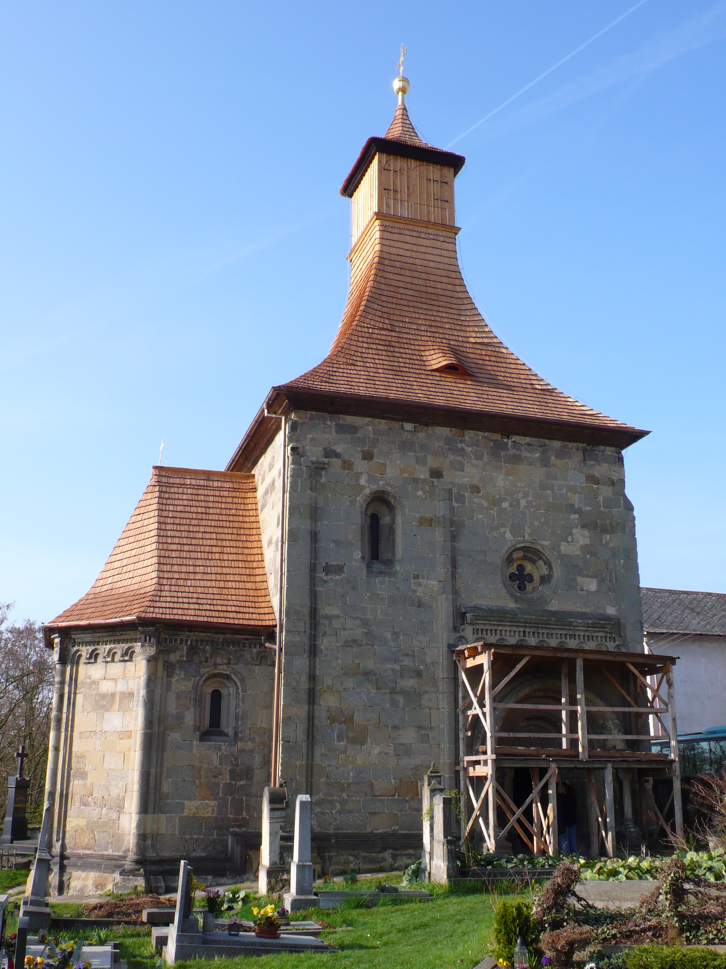 Kostel svatého Mikuláše ve Vinci